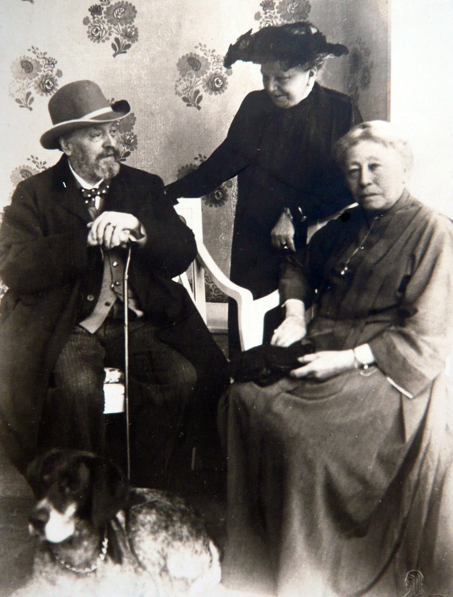 Benoit Oppenheim (1842–1931) war ein deutscher Bankier und Kunstsammler. Mit seinen Schwestern Anna Oppenheim, der Frau von Hugo Oppenheim (1847–1921) und Marie geborene Oppenheim, Frau von Ernst von Leyden.